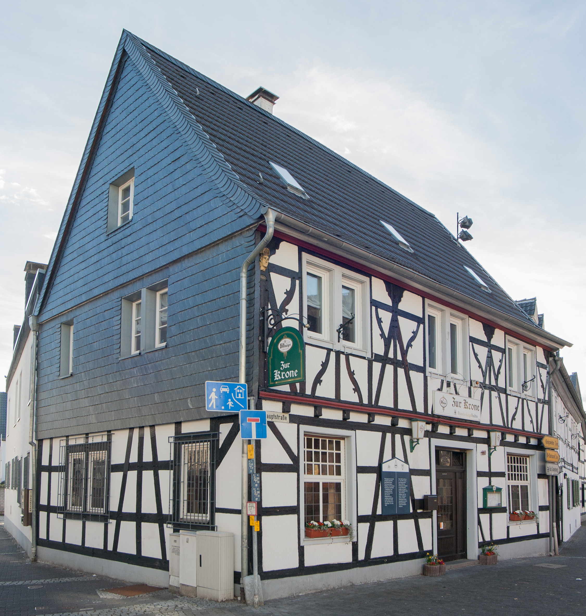 Gasthaus Zur Krone, Hauptstraße 110, Niederdollendorf, Königswinter, Deutschland